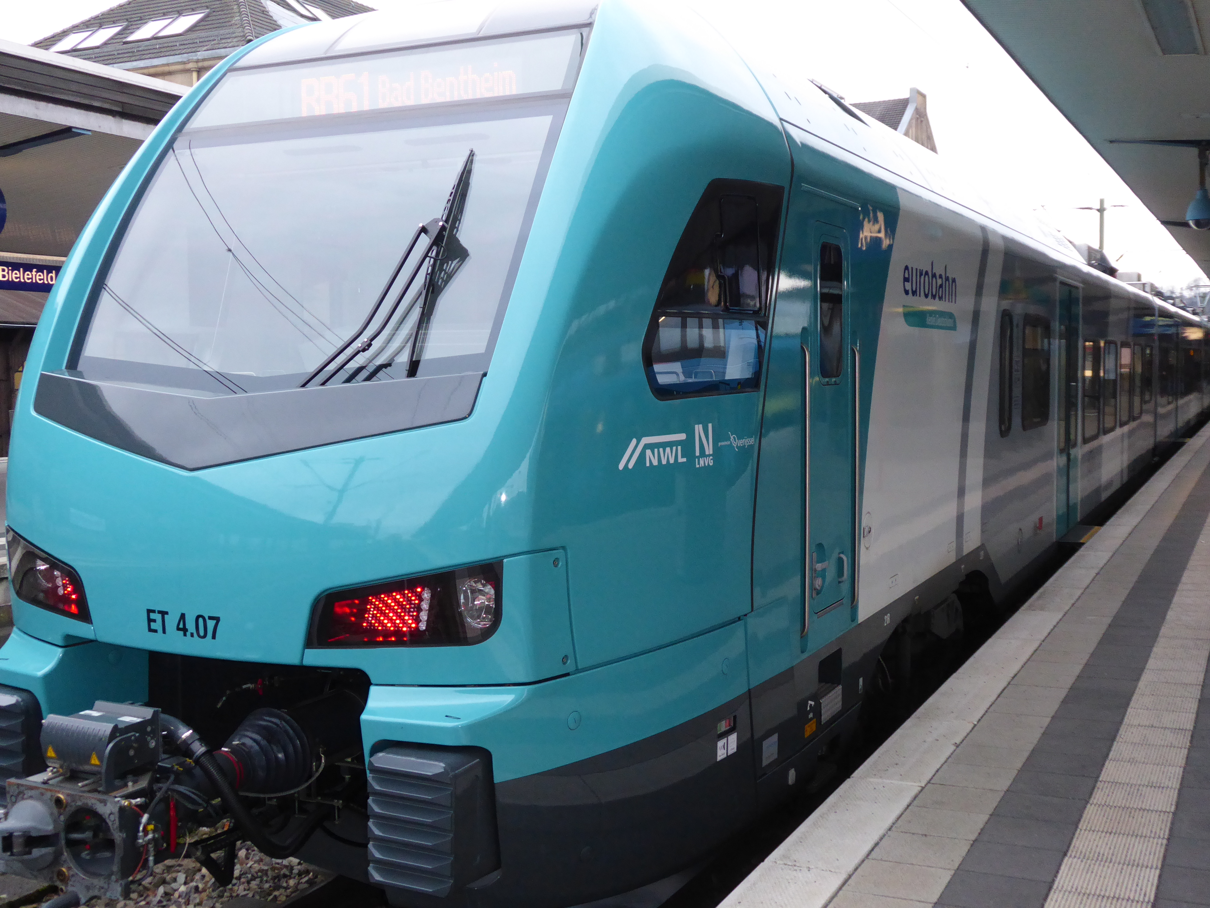 Stadler Flirt 3 ET 4.07 der Eurobahn in Bielefeld Hauptbahnhof. Corporate Design von Keolis anlässlich der Übernahme des Teutoburger-Wald-Netzes im Dezember 2017.